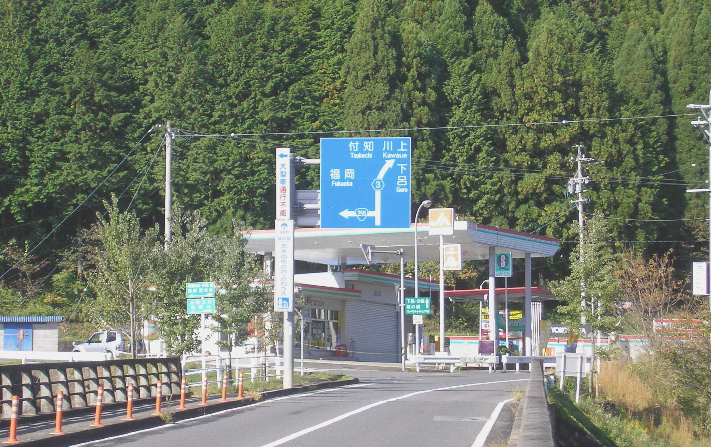 岐阜県中津川市坂下にて、国道256号と岐阜県道3号の分岐点を南方から撮影。左手に折れるのが256号。どう見てもメインルートは県道3号である。2007年10月